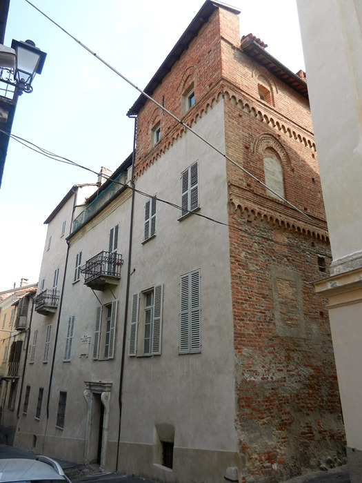 Mondovì - Casa di Giovanni Giolitti